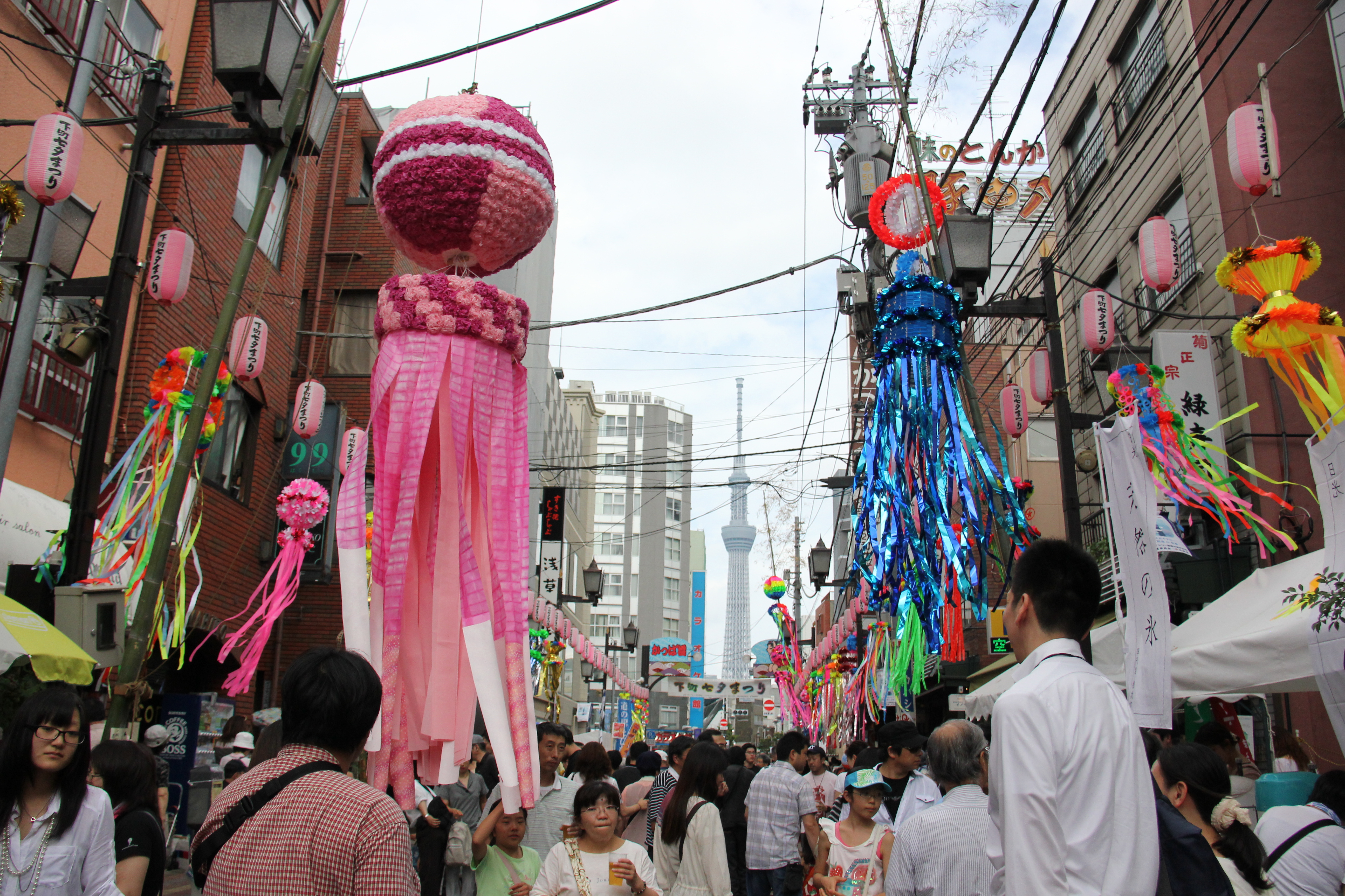 Shitamachi Tanabata Matsuri